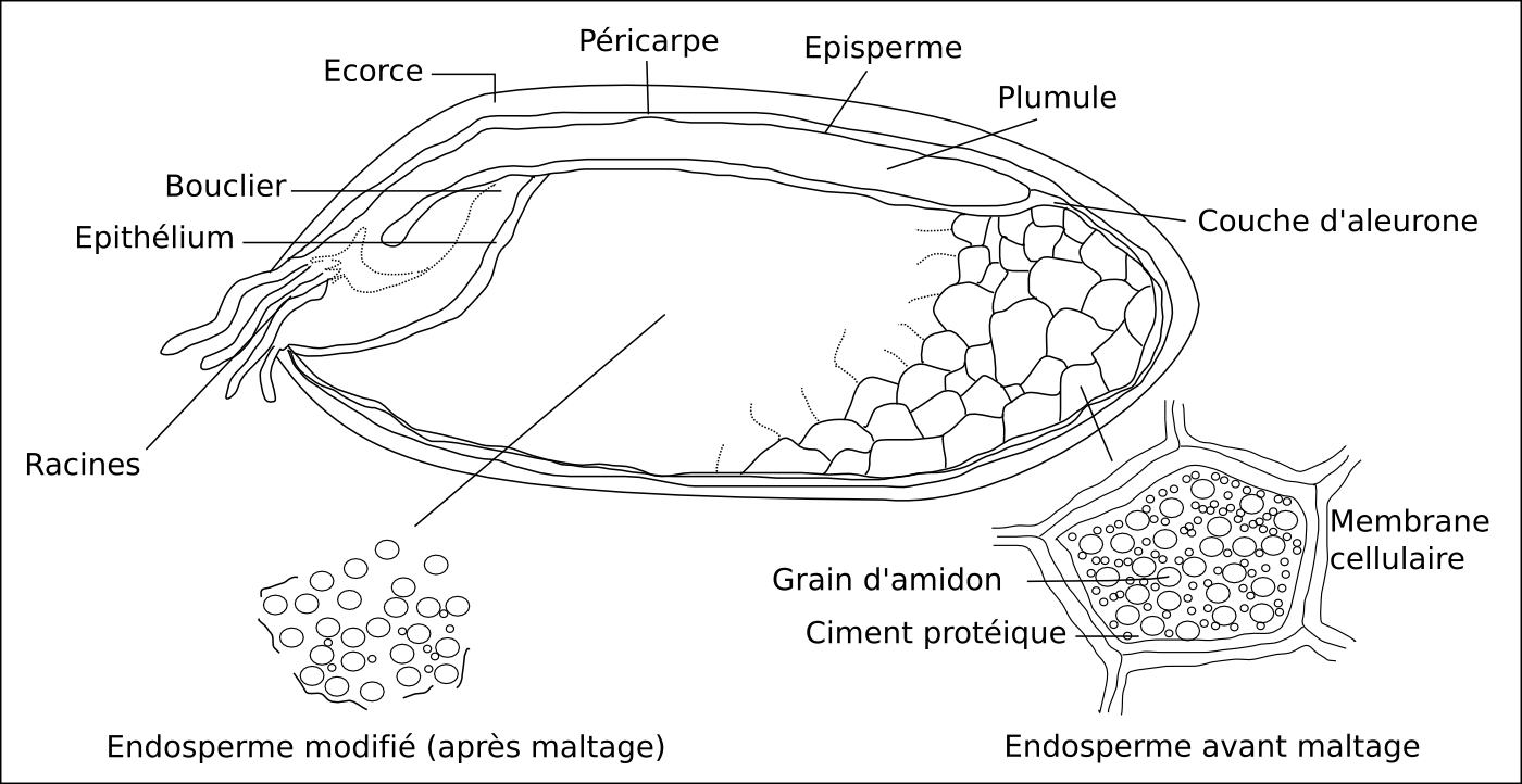 Description : Il s'agit d'une coupe longitudinale d'un grain d'orge. "Fait maison" dans le cadre du Projet Bière. Author : Frozman Upload : 03/14/2006